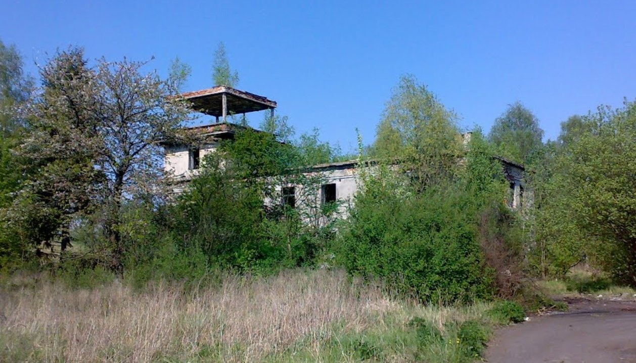 Zdewastowana Wieża Kontroli Lotów na byłym radzieckim lotnisku w Kluczewie